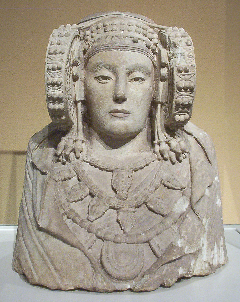 Iberian sculpture